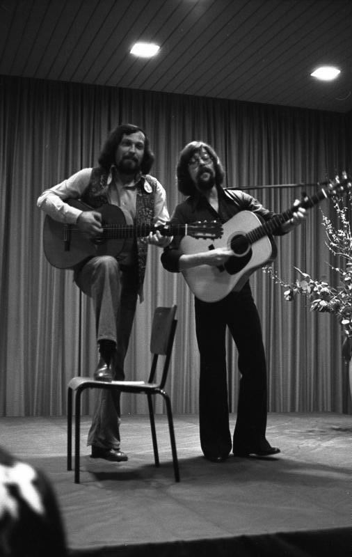 Landesvertretung Berlin in Bonn. Vortragsabend mit "Schobert & Black"